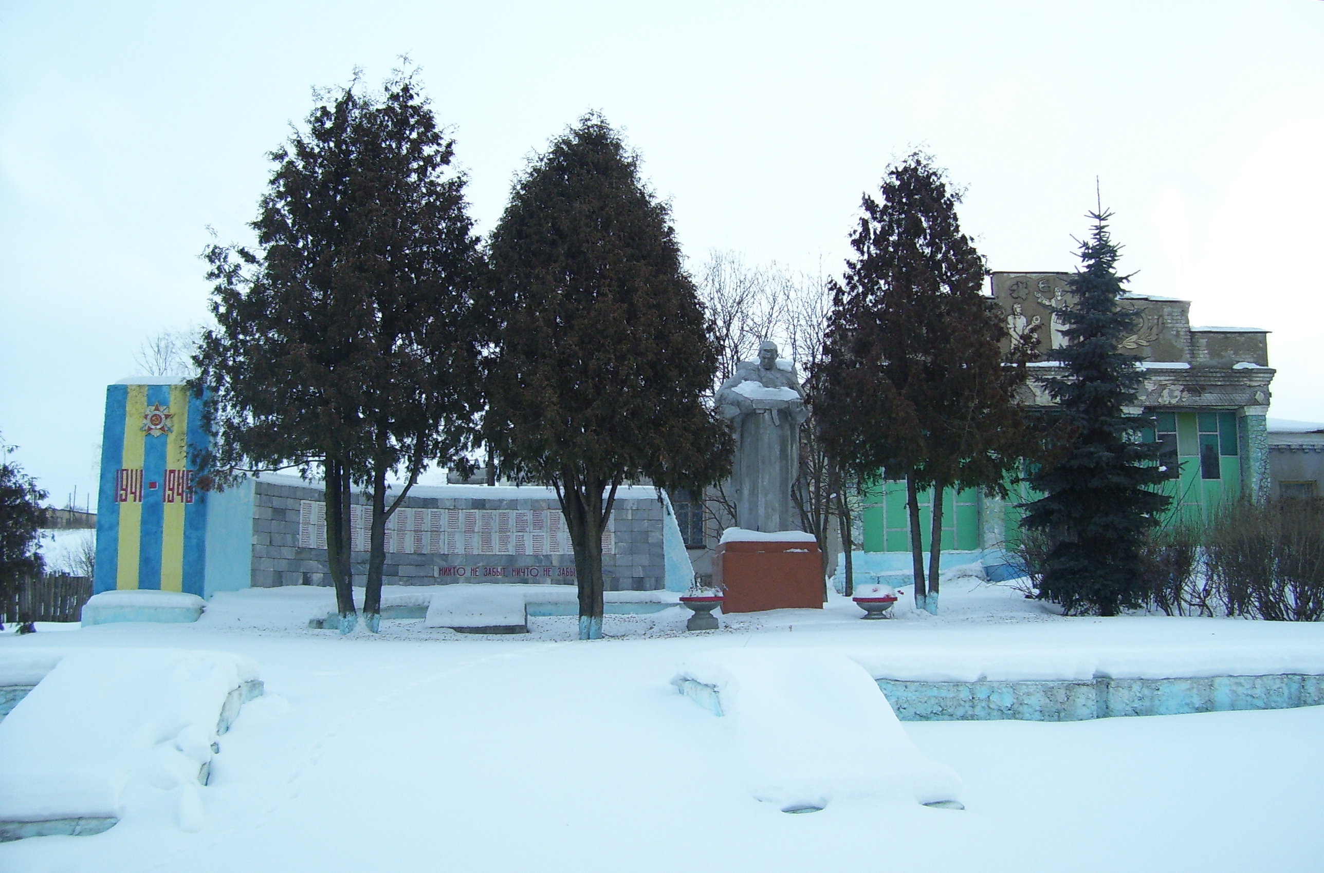 Мемориал воинам погибшим в годы Великой Отечественной Войны 1941-1945гг.Клуб села Рождествено